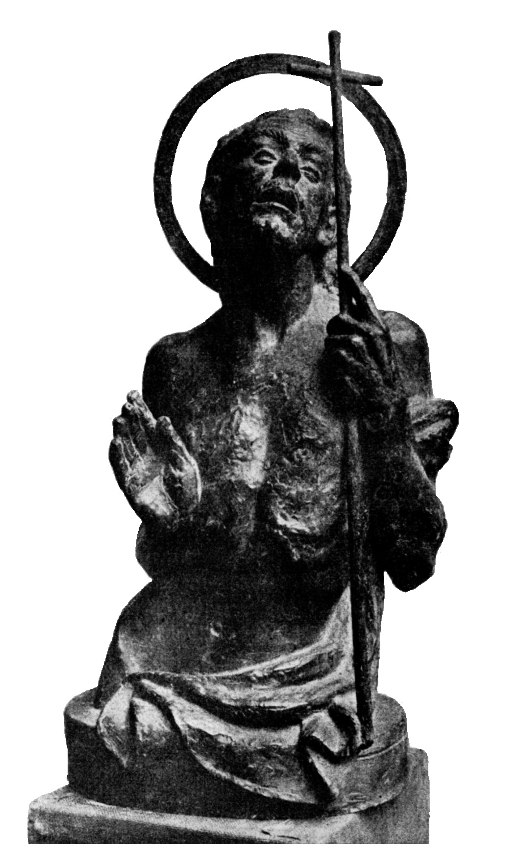 Sfântul Ioan Botezătorul - sculptură prezentă la Salonul Oficial de primăvară din anul 1939